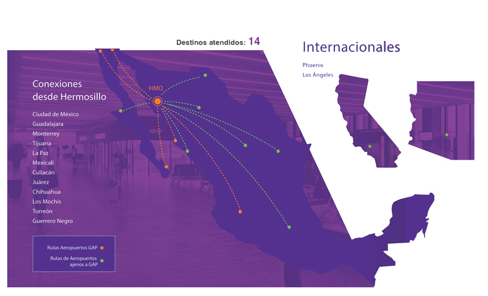 Destinos Hermosillo